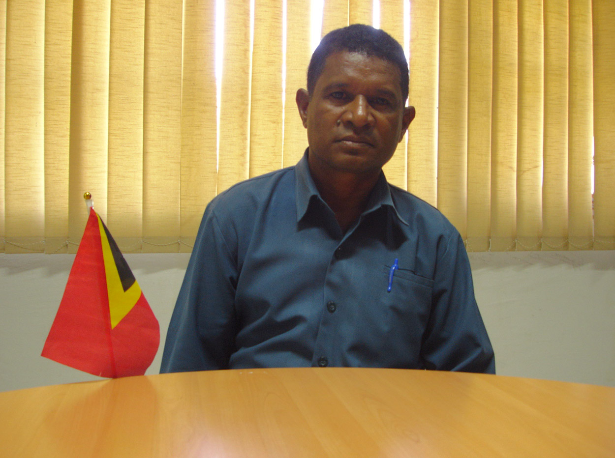 Carlos de Araújo, Administrator des Subdistrikts Remexio